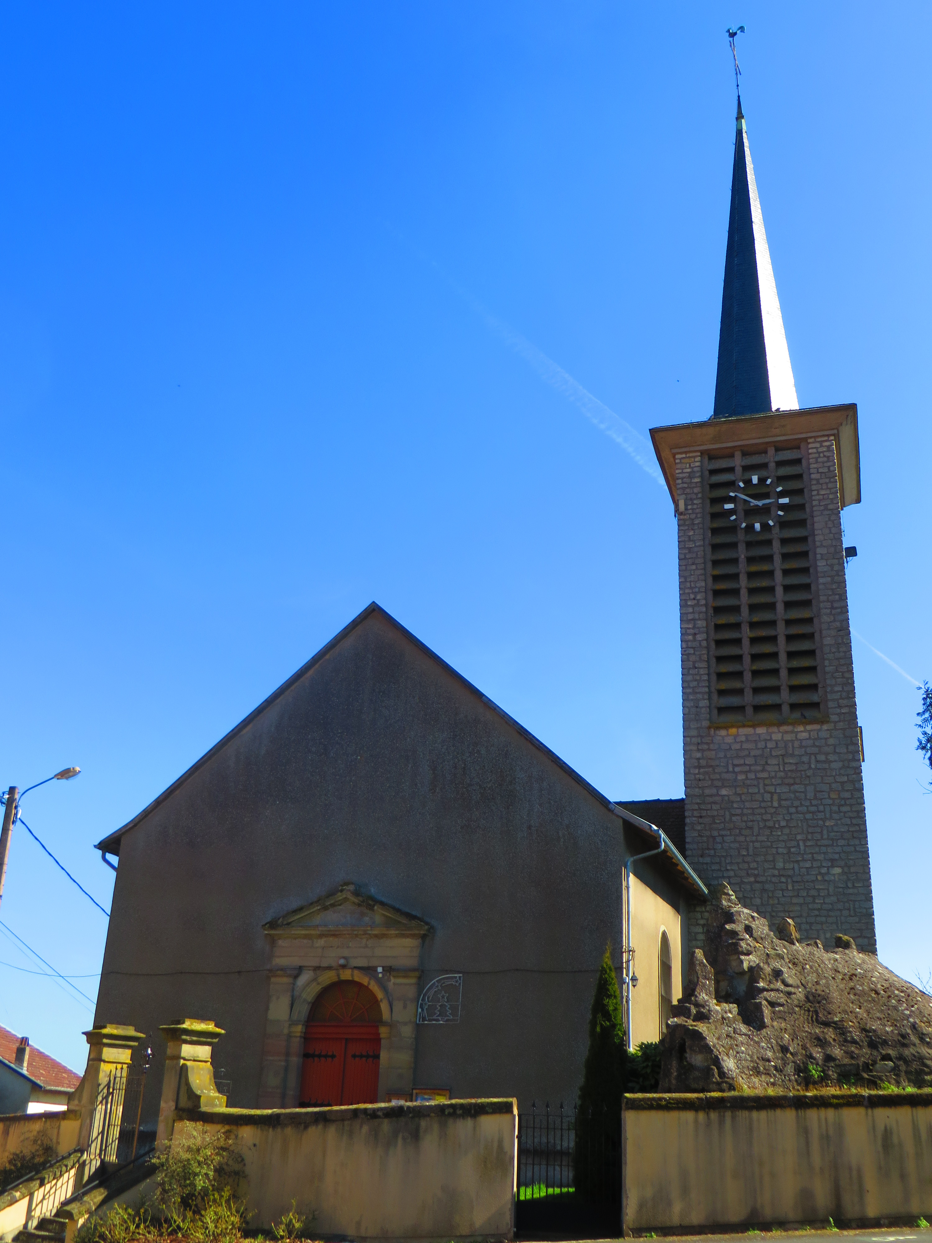 Viller Église Saint-Jacques-le-Majeur